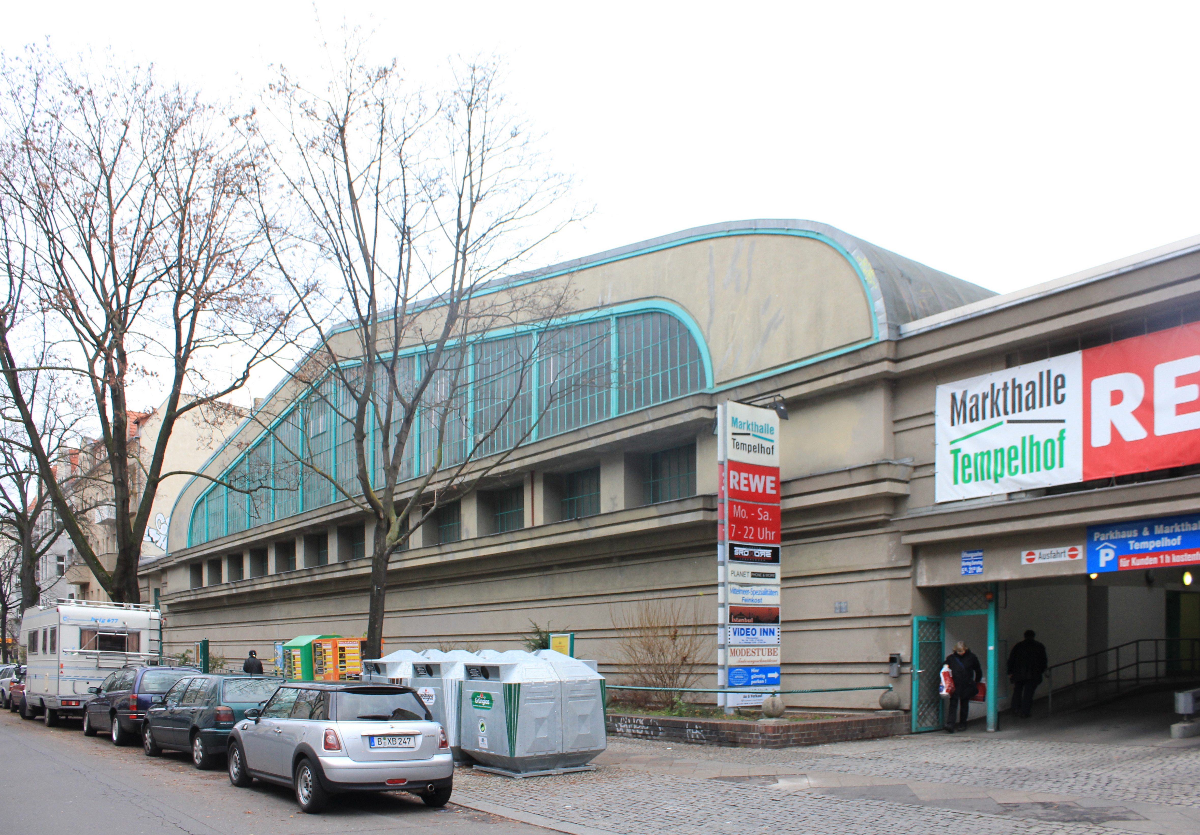 Straßenbahndepot 1924-25 von Jean Krämer